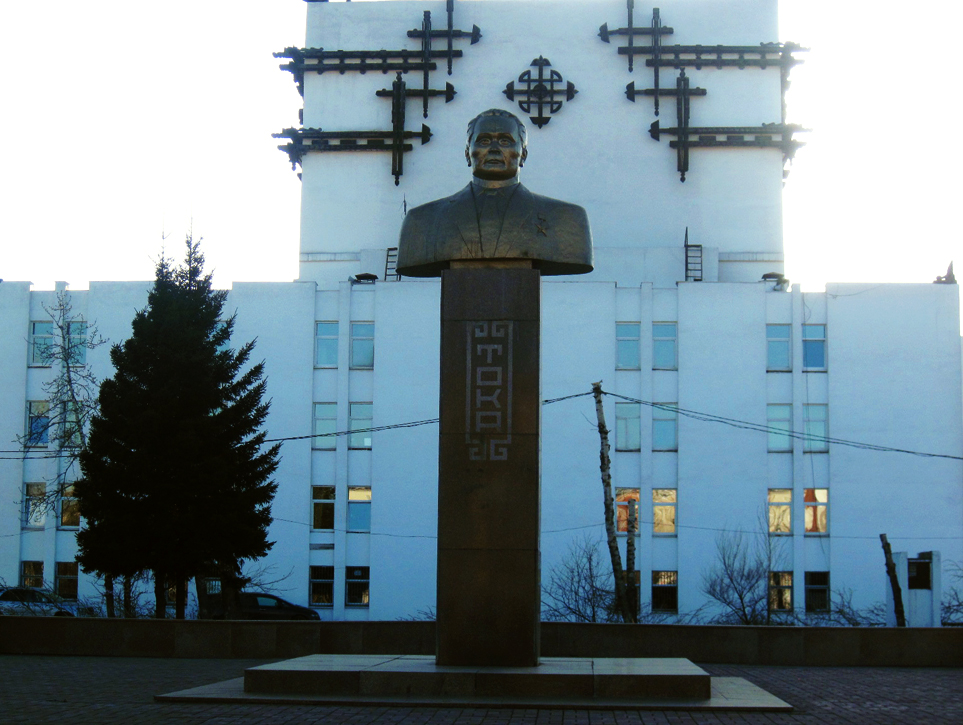 Памятник «Салчак Калбак-Хорековичу Тока» в городе Кызыл, Республики Тыва.Тыва дыл: Кызыл хоорайда Салчак Калбак-Хөрекович Токаның тураскаалы.